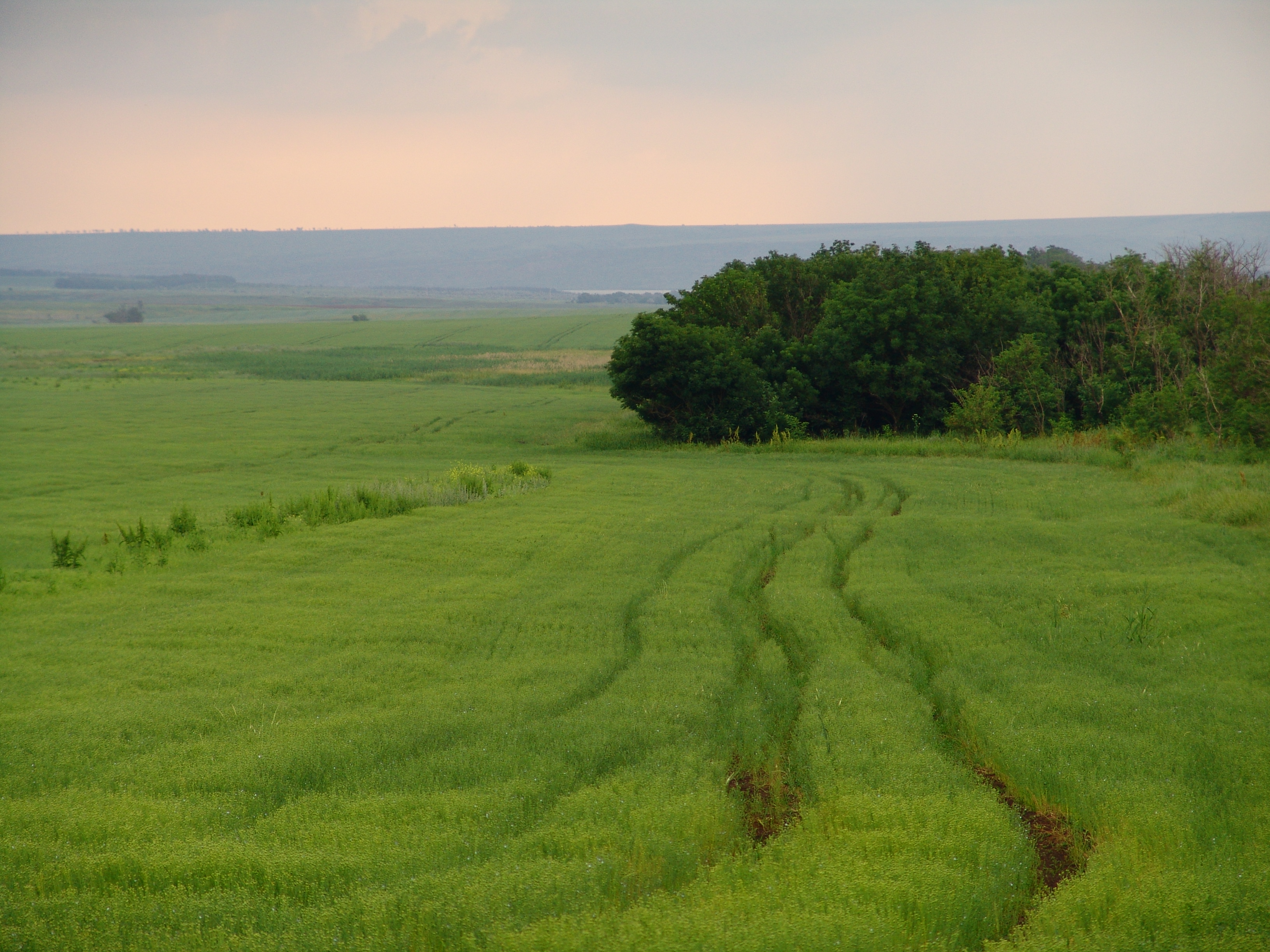 Лен/Flax